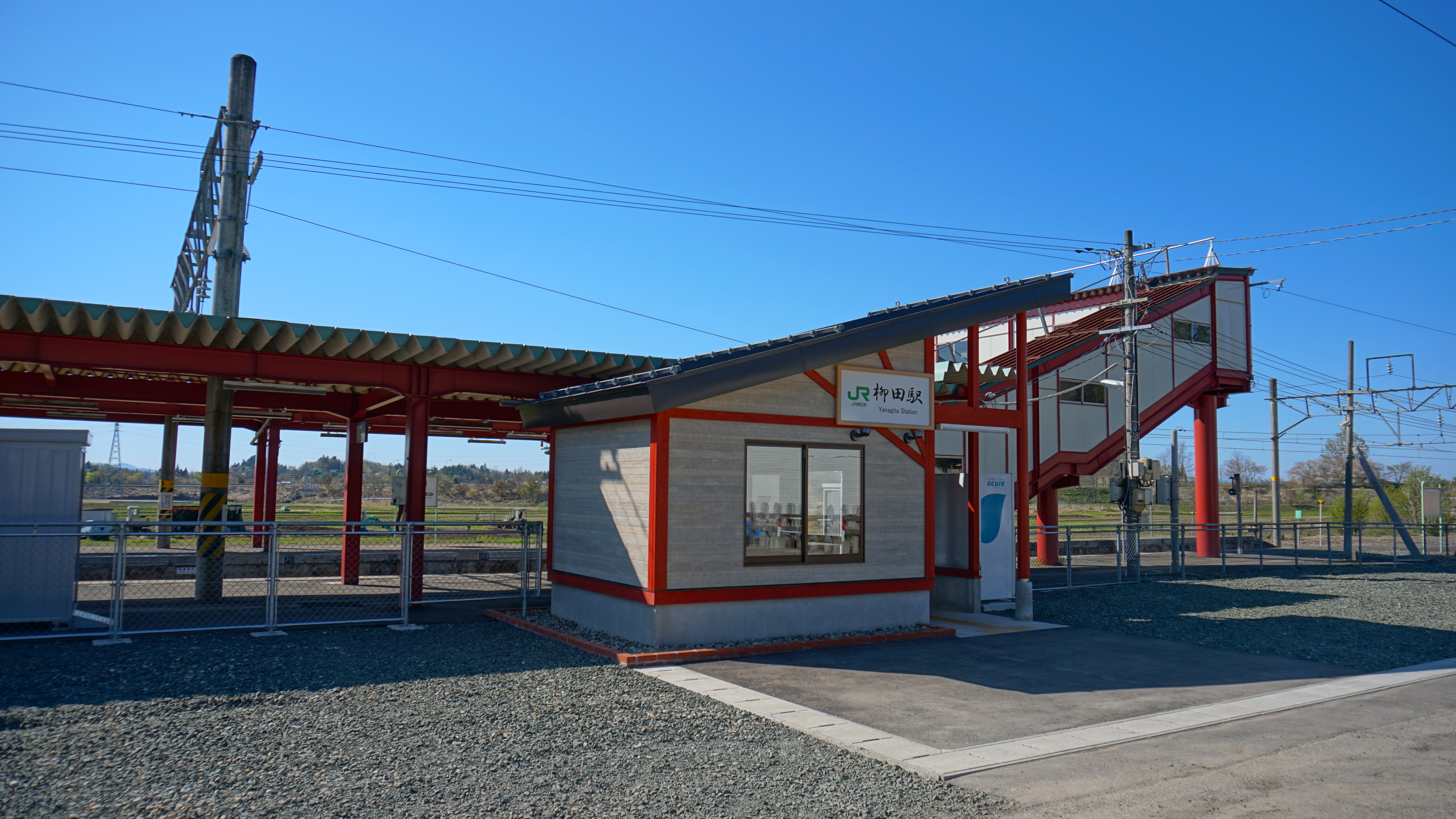 奥羽本線・柳田駅（秋田県横手市）